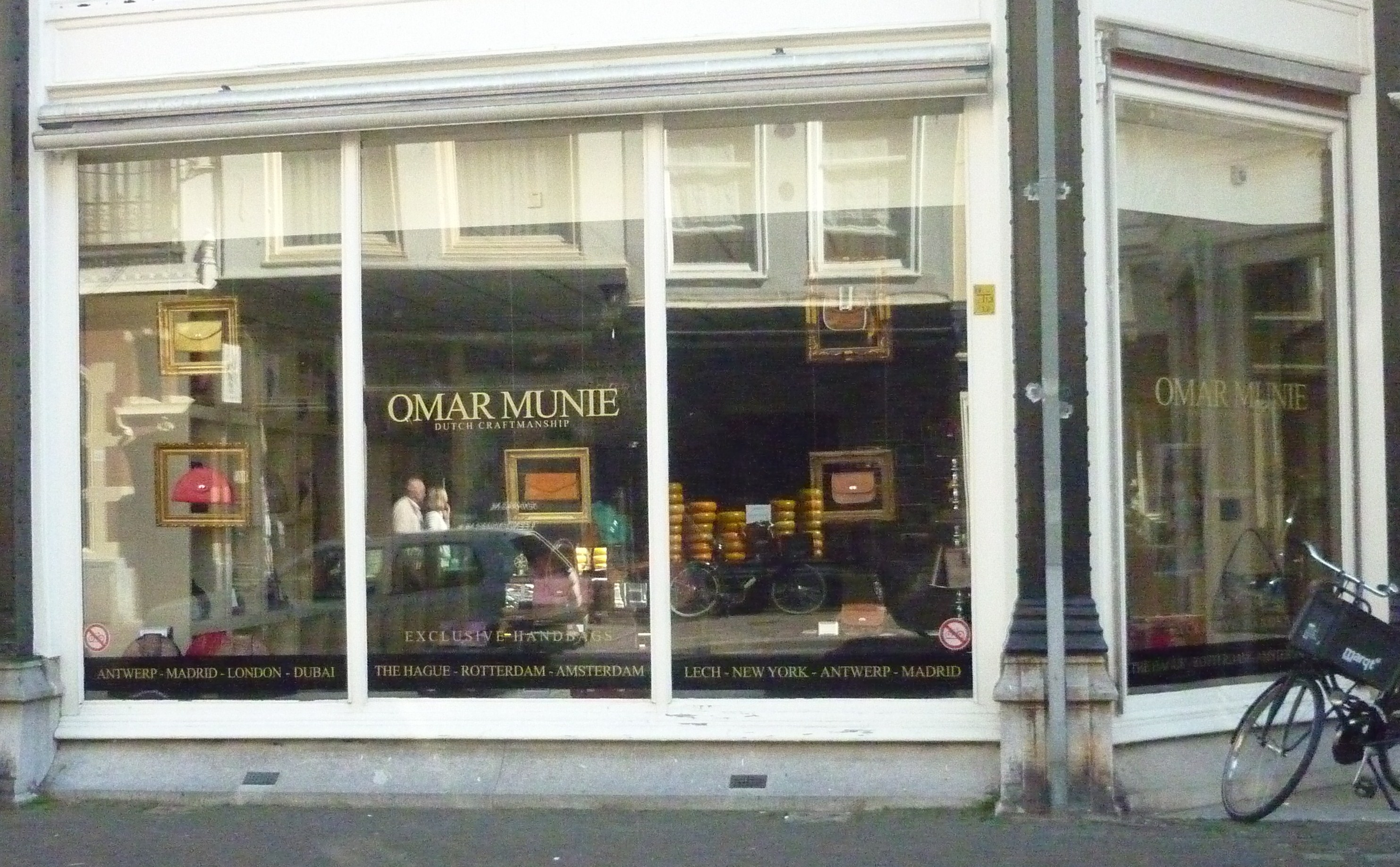 winkel van Omar Munie in de Prinsestraat in Den Haag